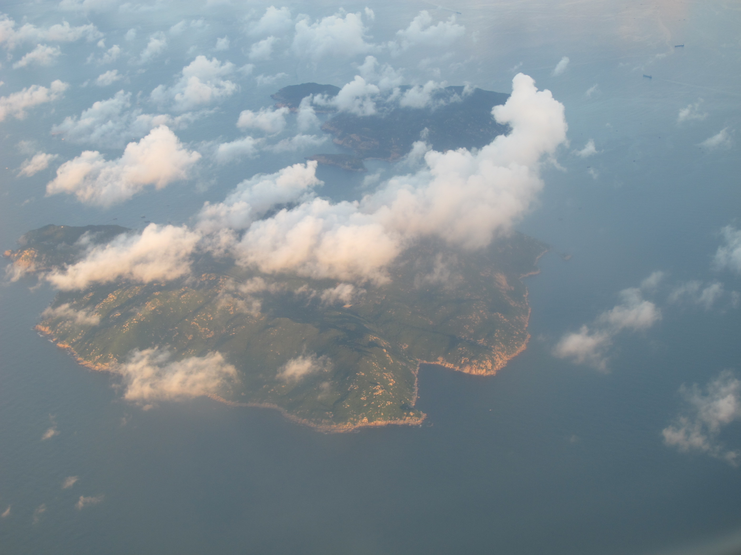 Wikimania 2013 in Hong Kong islands near Hong Kong